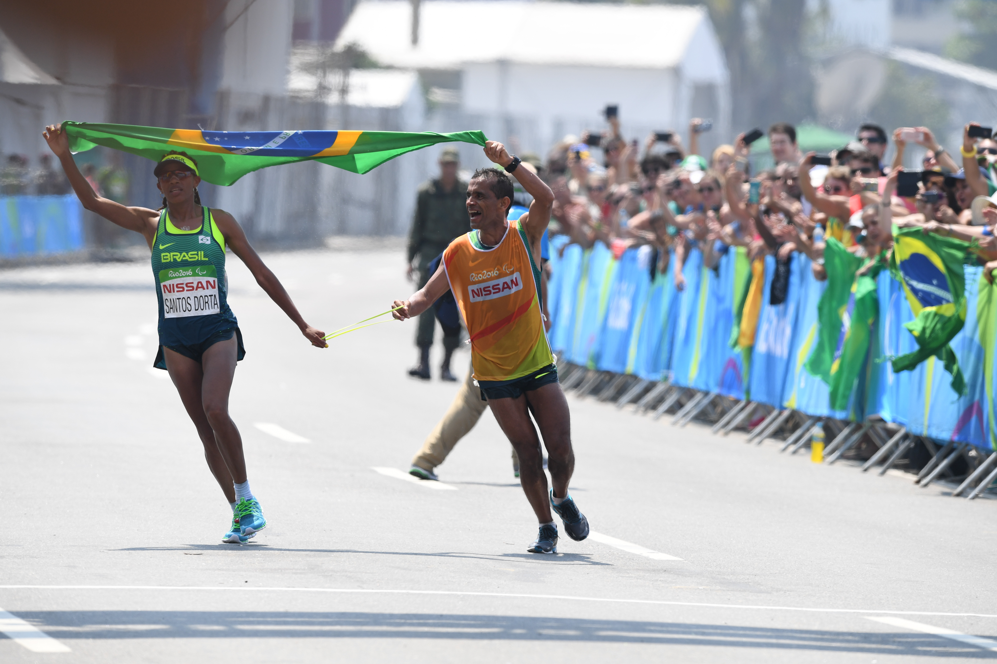 Rio de Janeiro - A brasileira, Edneusa Santos Dorta foi bronze na categoria T12 na maratona Paralímpica T12 e T46, na praia de Copacabana (Tânia Rêgo/Agência Brasil)